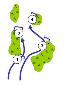 Schematische Darstellung des überschlagenden Vorgehens